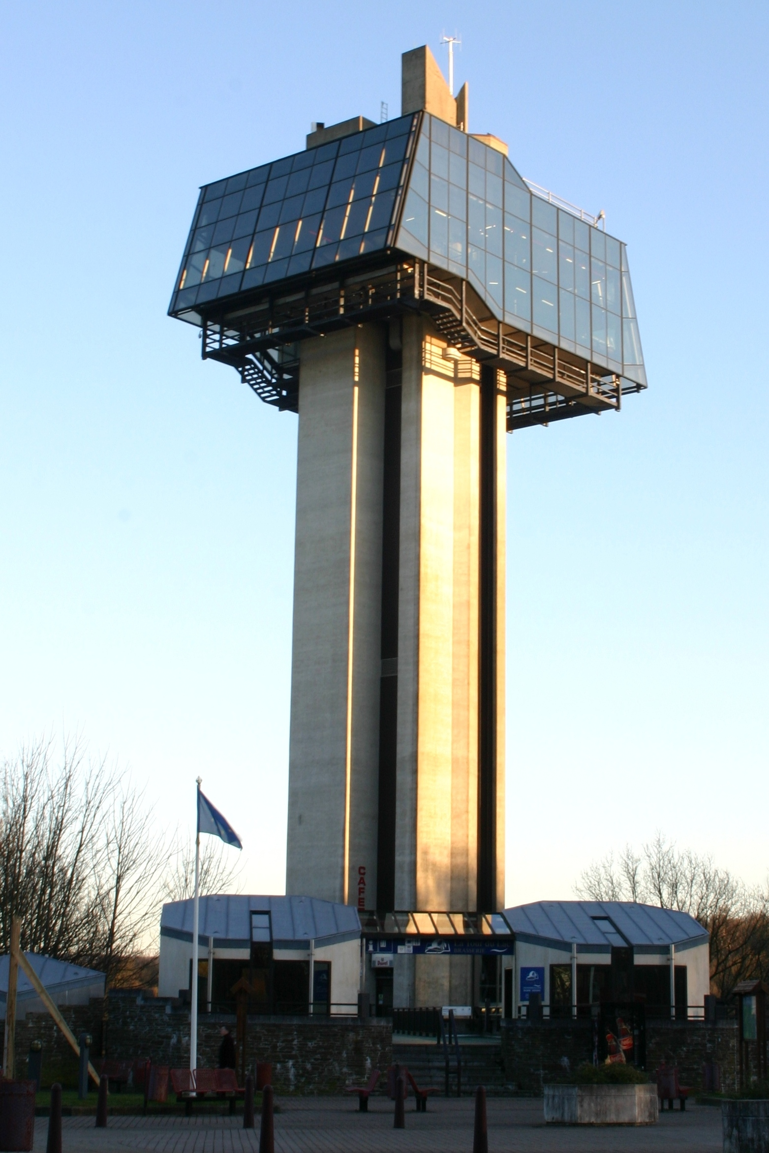 Tuerm bei der Gileppetalspär.